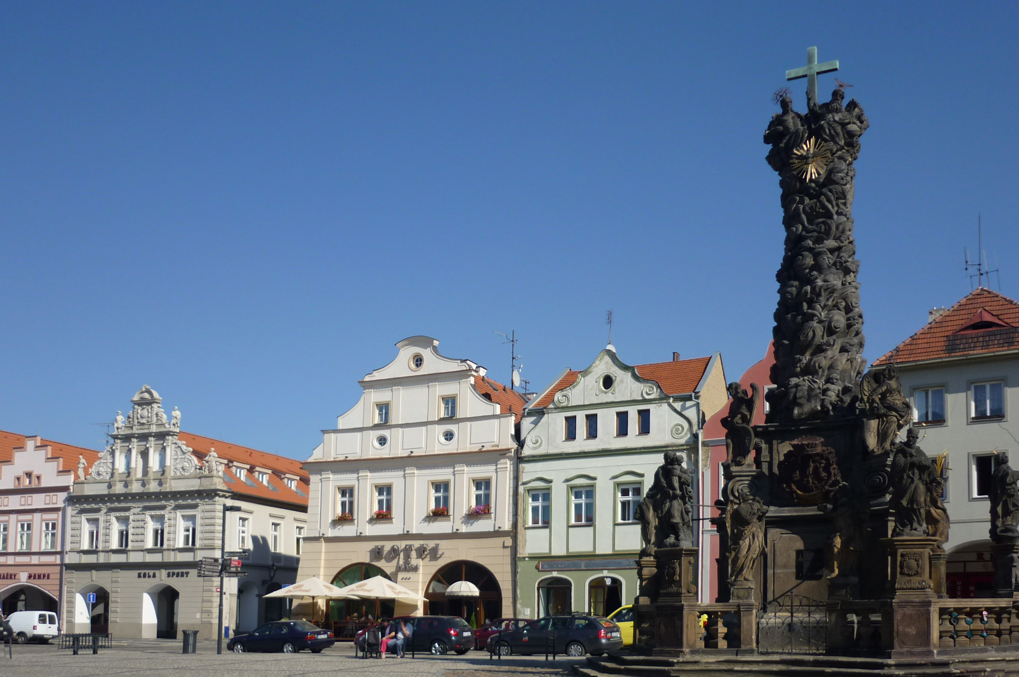 Ringplatz mit Dreifaltigkeitssäule in Saaz